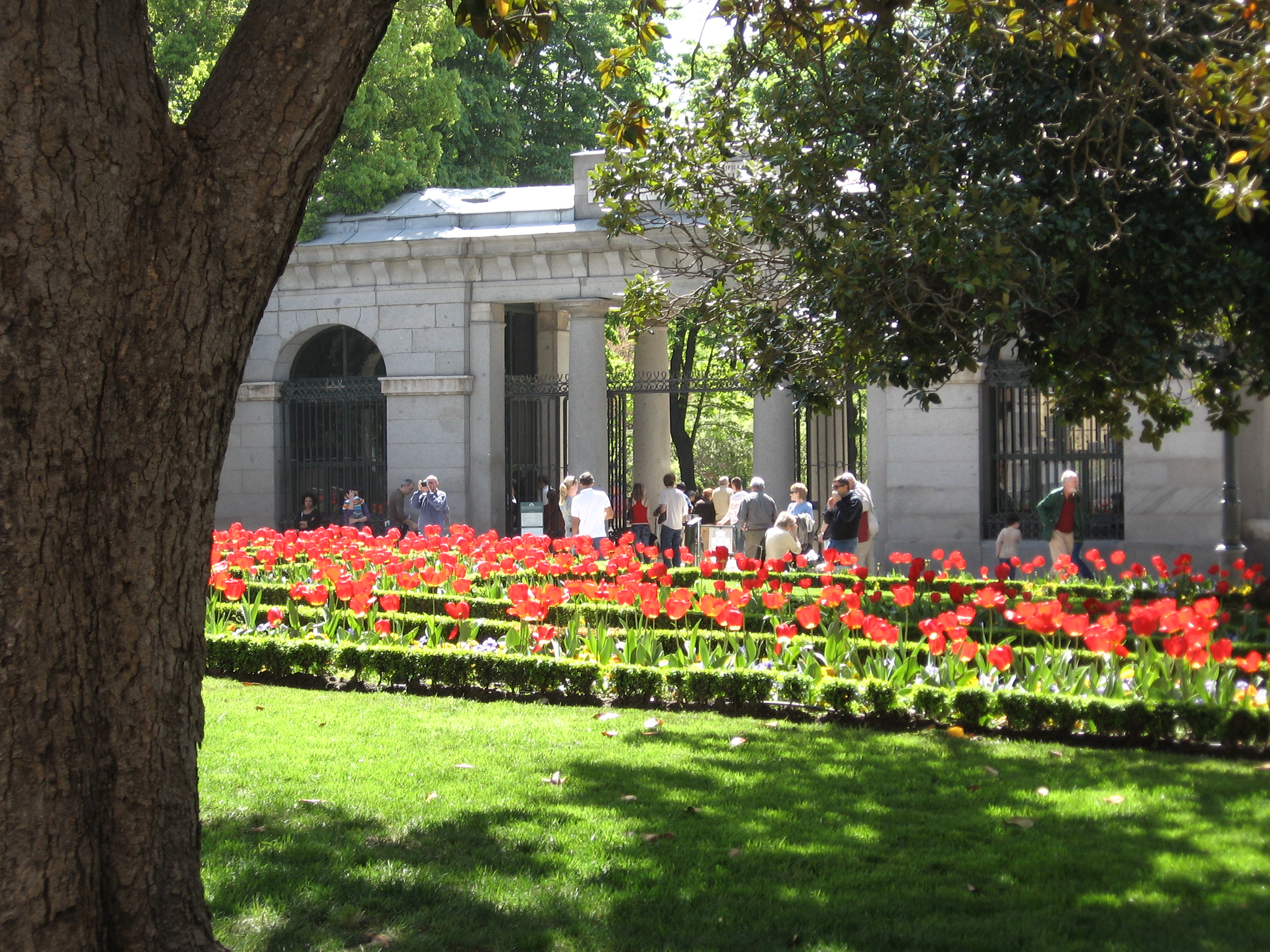 Puerta de Murillo, Real Jardín Botánico de Madrid